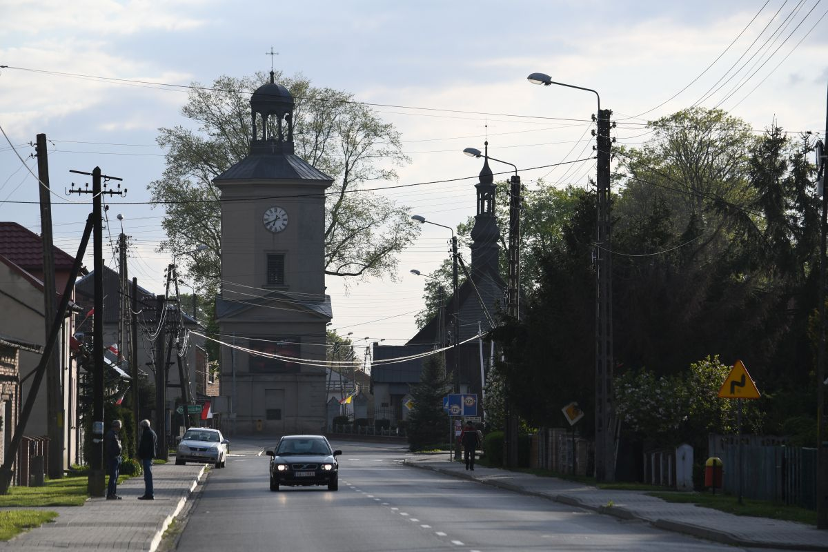 Skomlin 2019 r.